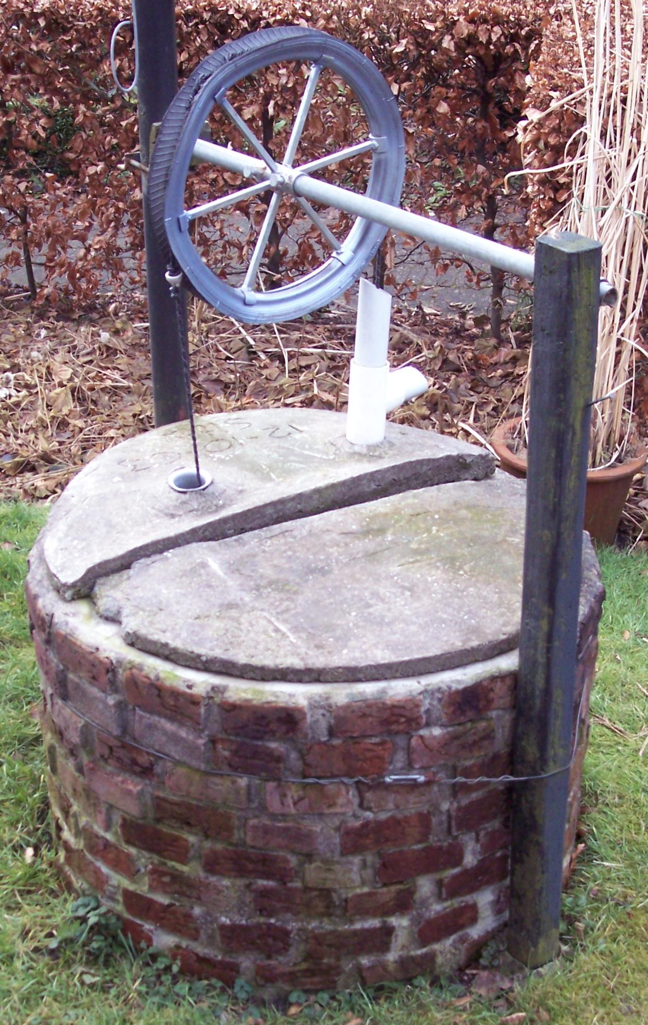 绳泵